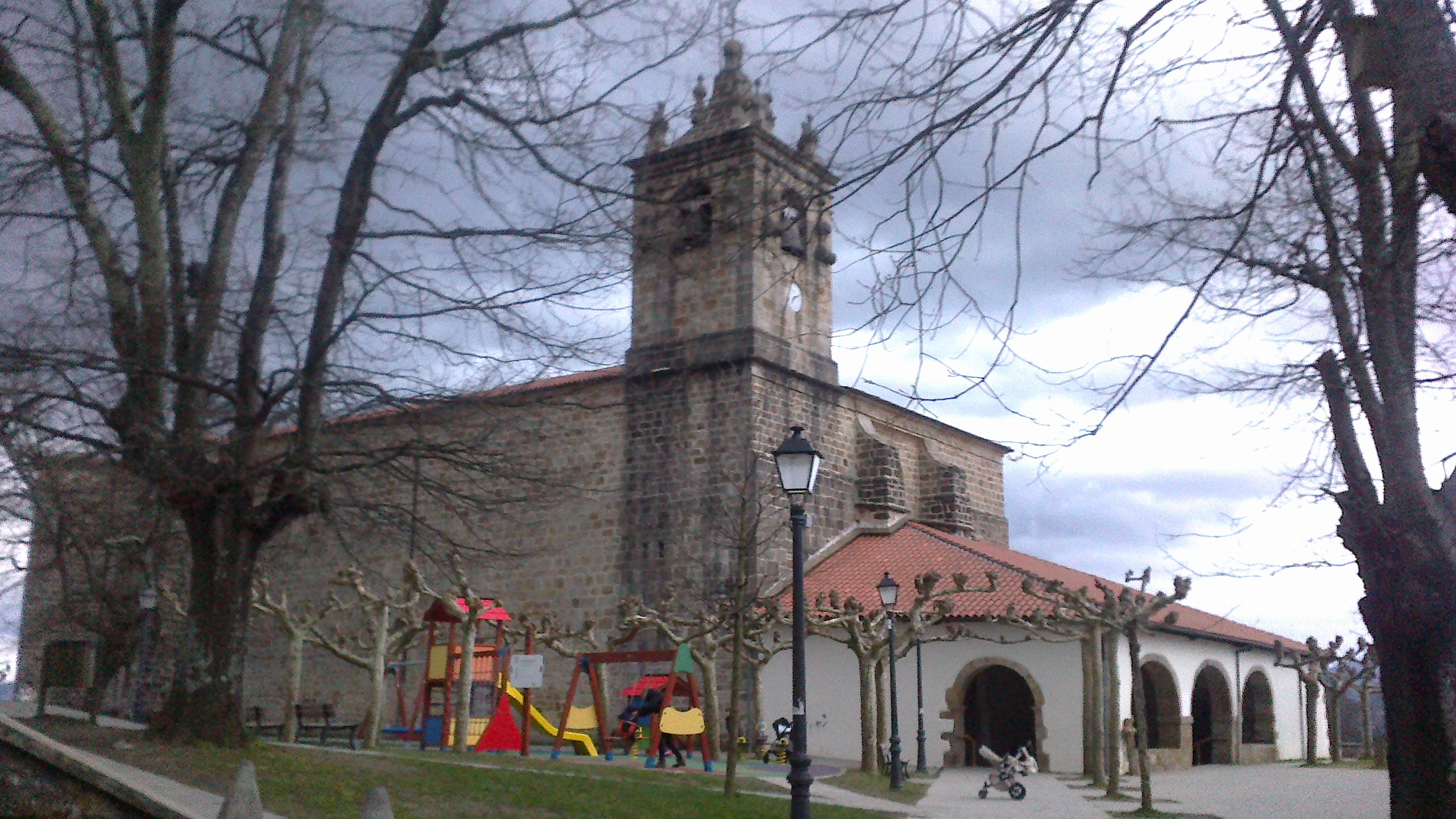 Gabiriako eliza (Gabiria, Gipuzkoa).